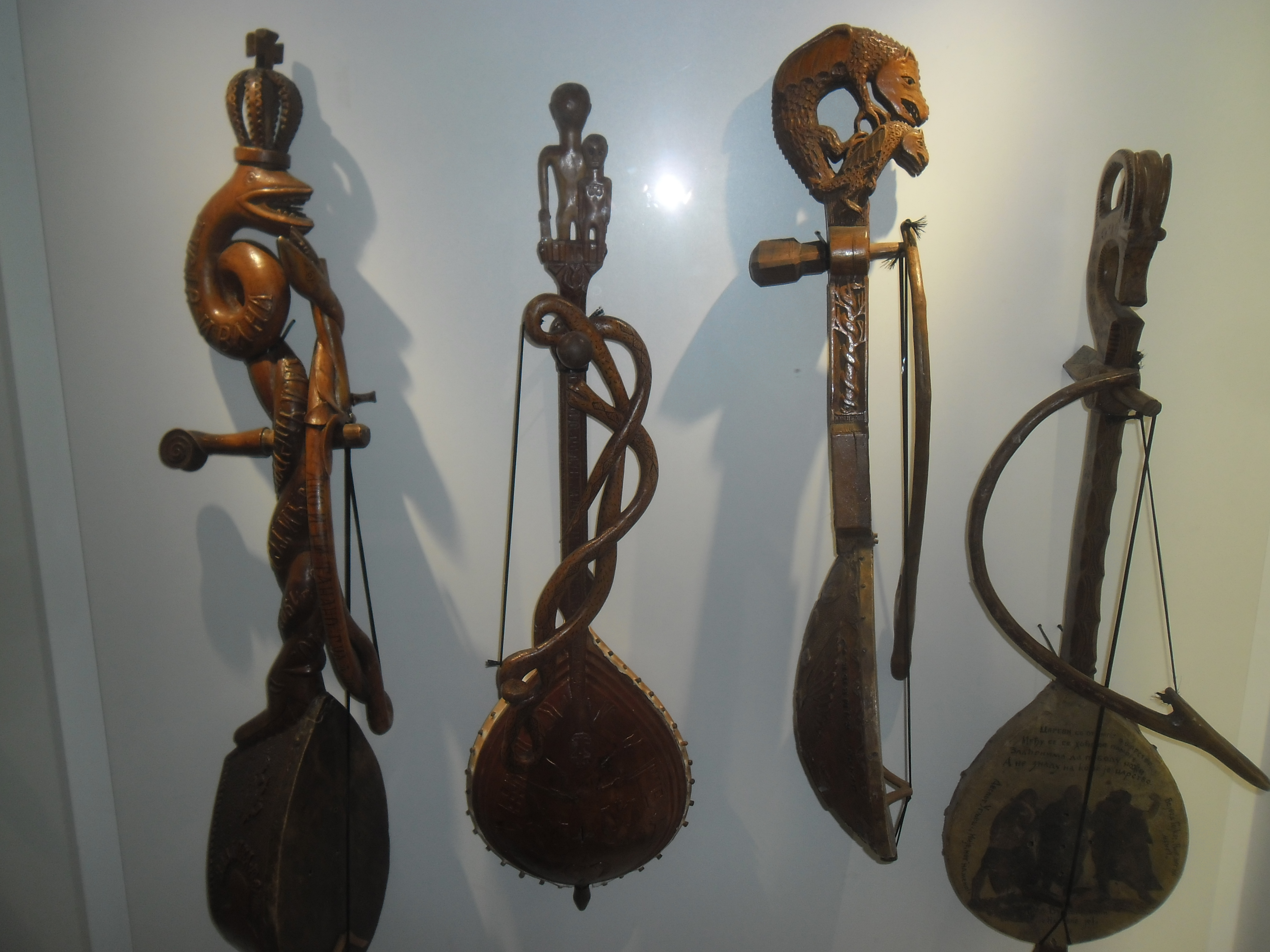 Cetinje